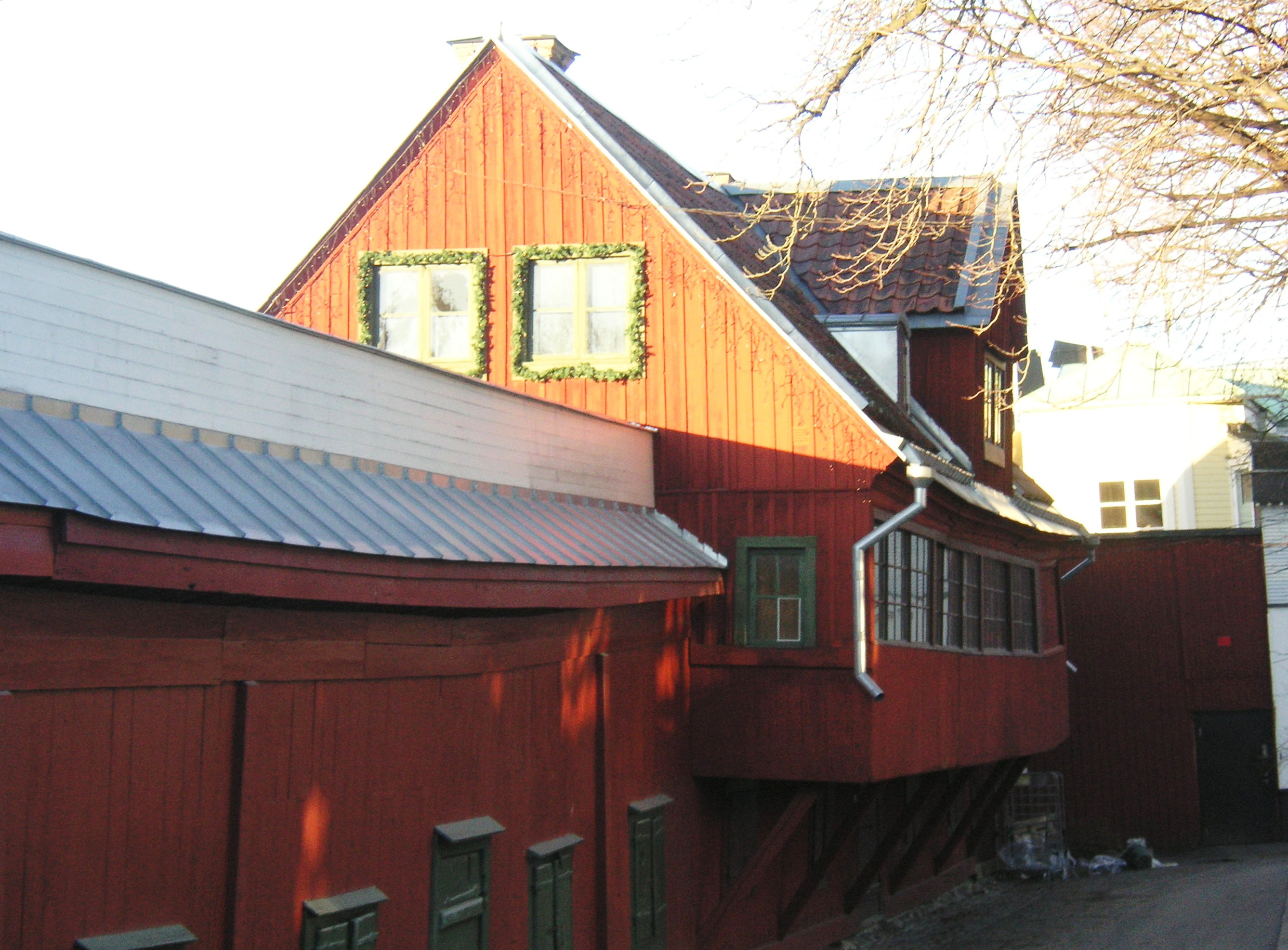 Bellmanhuset på Djurgården